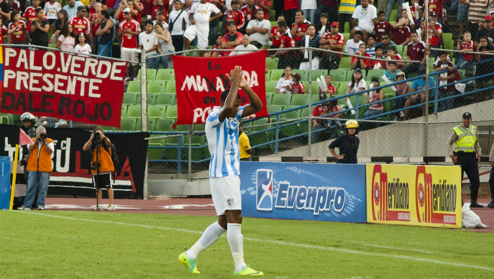 Salomón sale y se despide de los caraqueños.